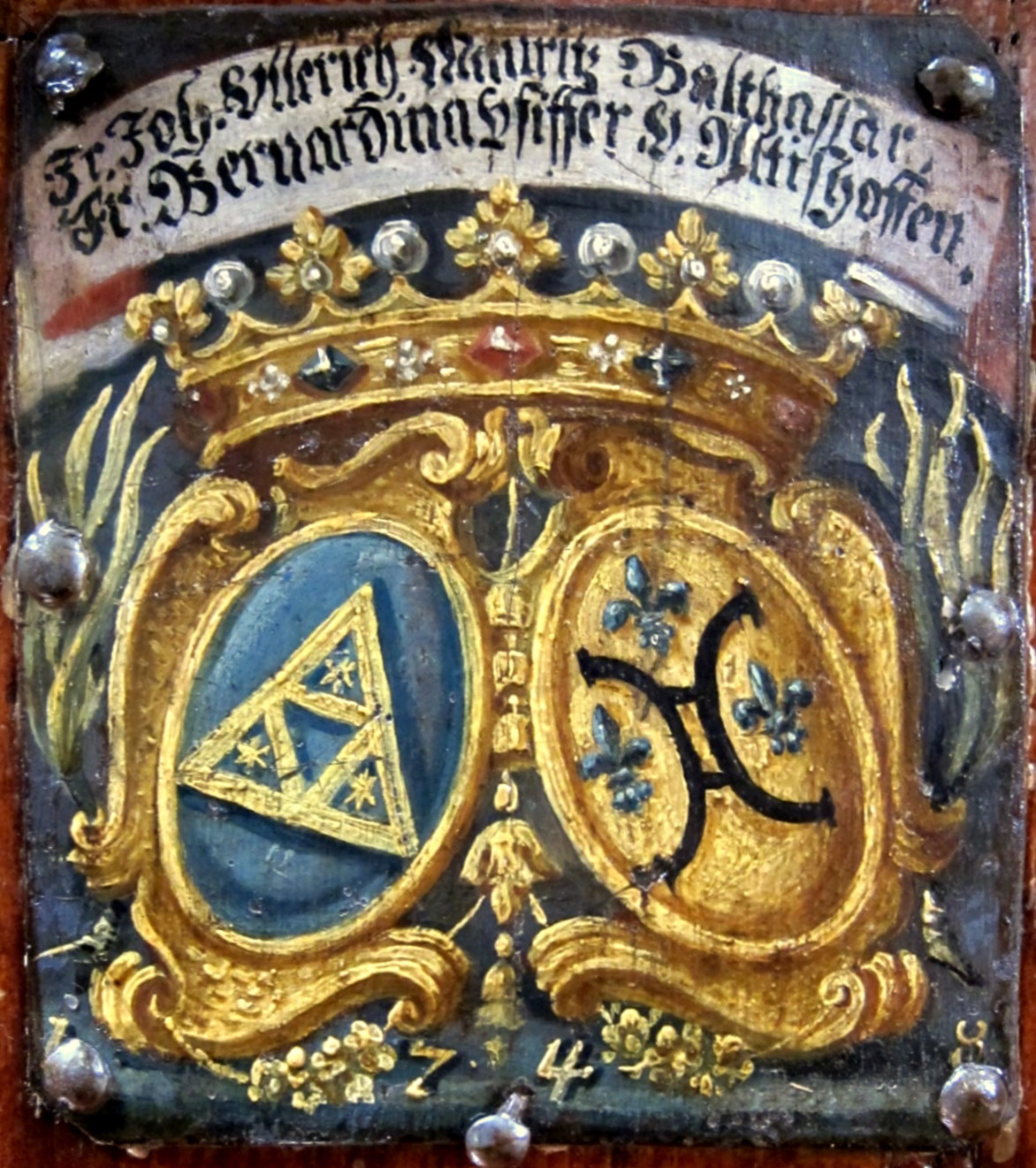 Allianzwappen der Familien Balthasar-Pfyffer in der Hofkirche Luzern